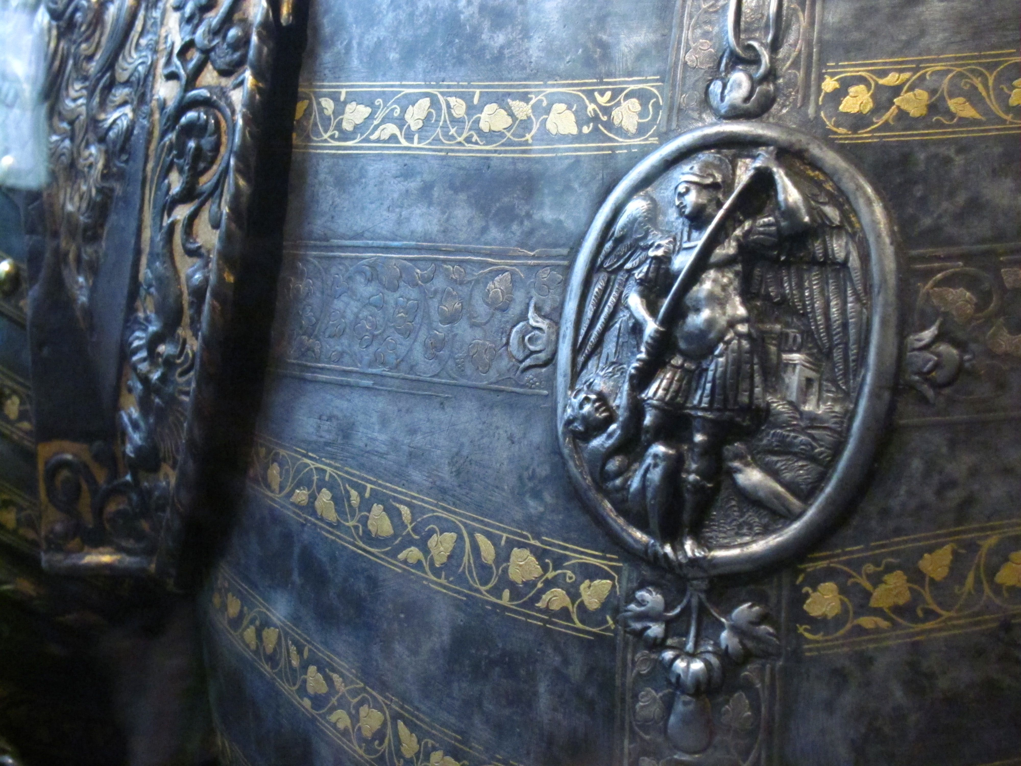 "Armure aux lions" rapprochée de François Ier